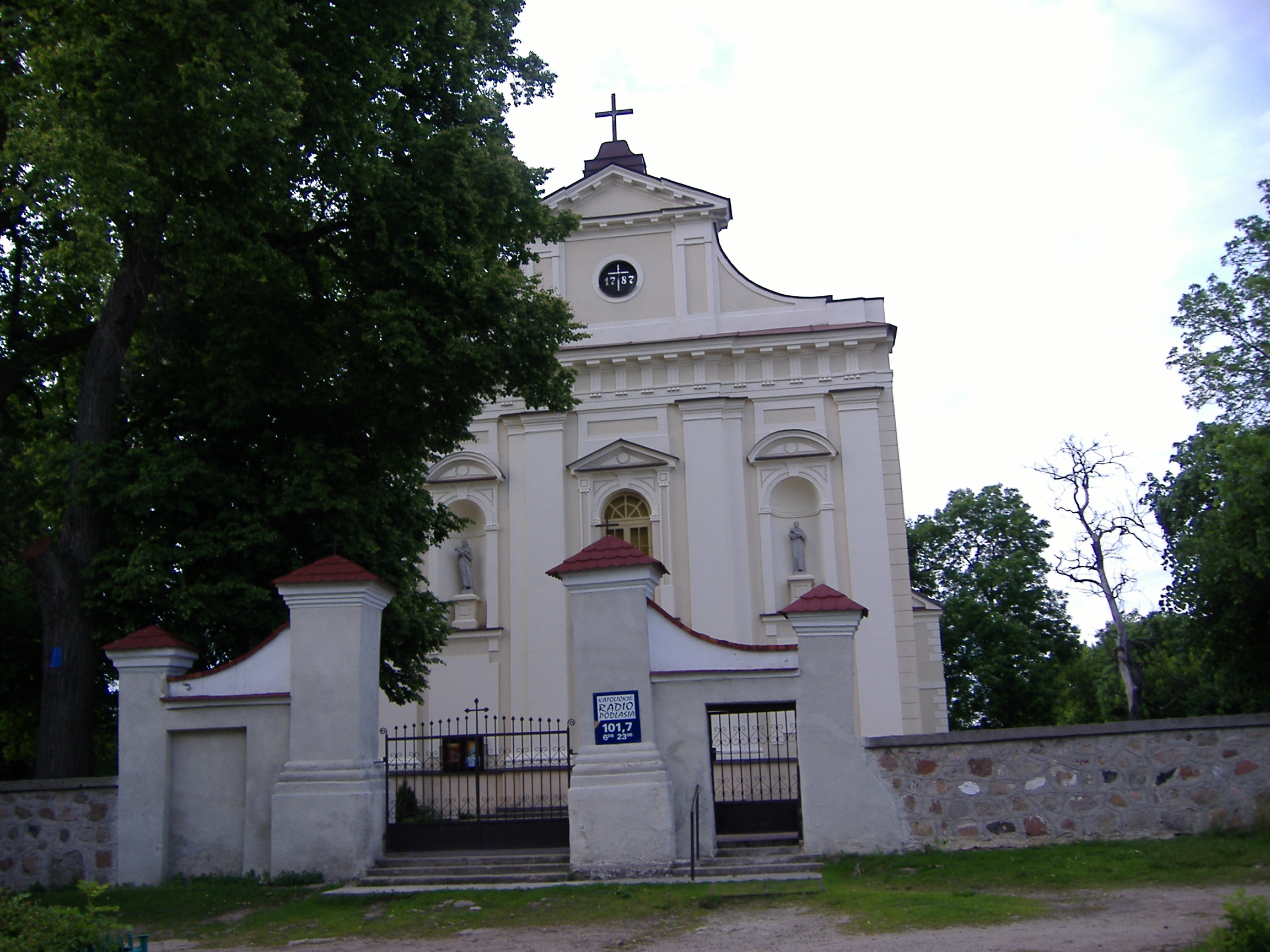 Niwiski - kościół rzymskokatolicki p.w. Wniebowzięcia NMP (zabytek nr 588/62). Fot.Janusz Jurzyk